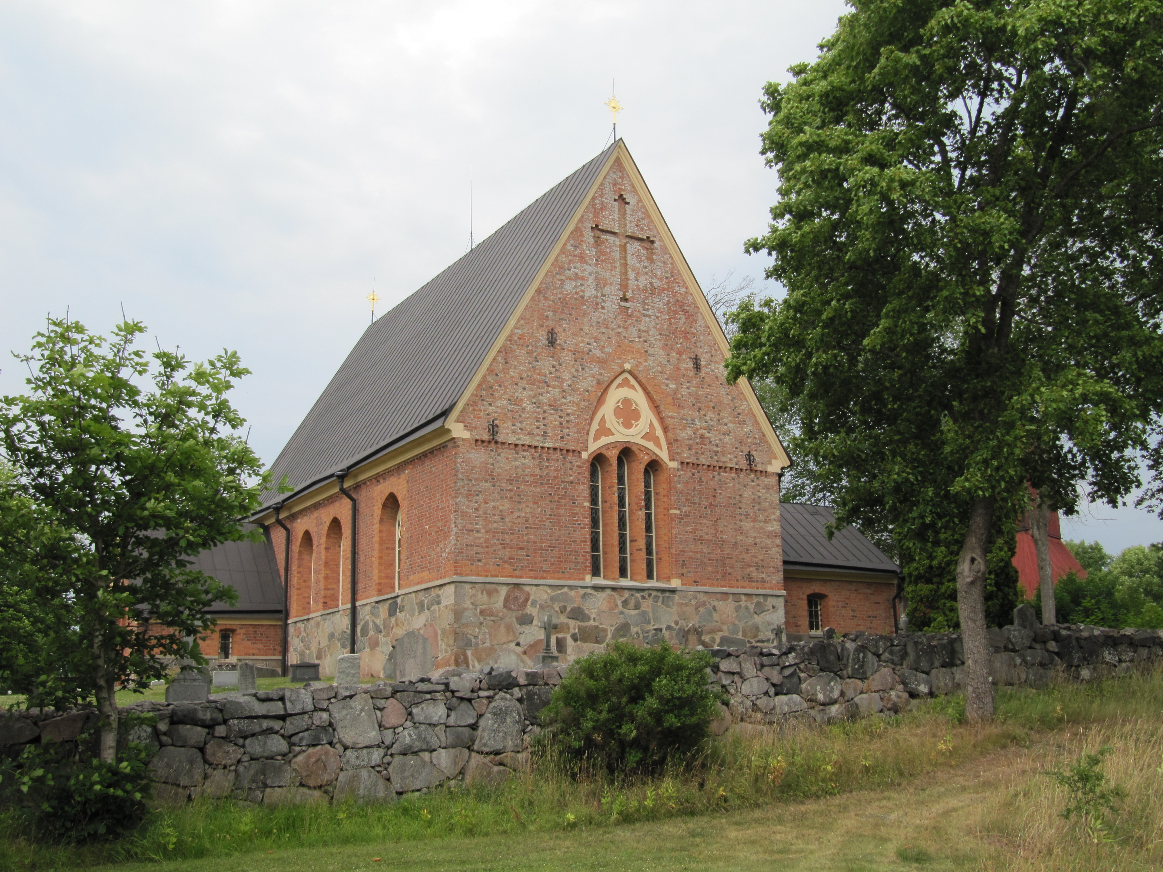 Tuna kyrka